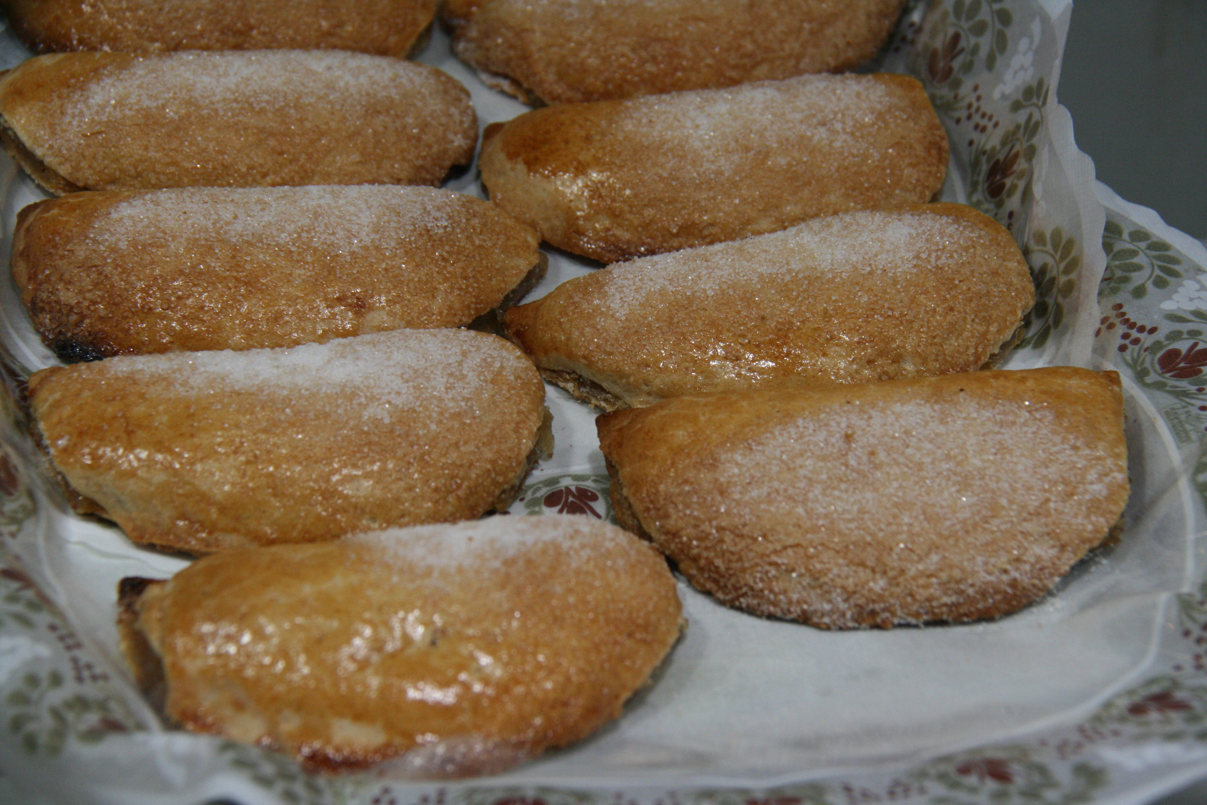 Pasteles de boniato - Pastisset de moniato